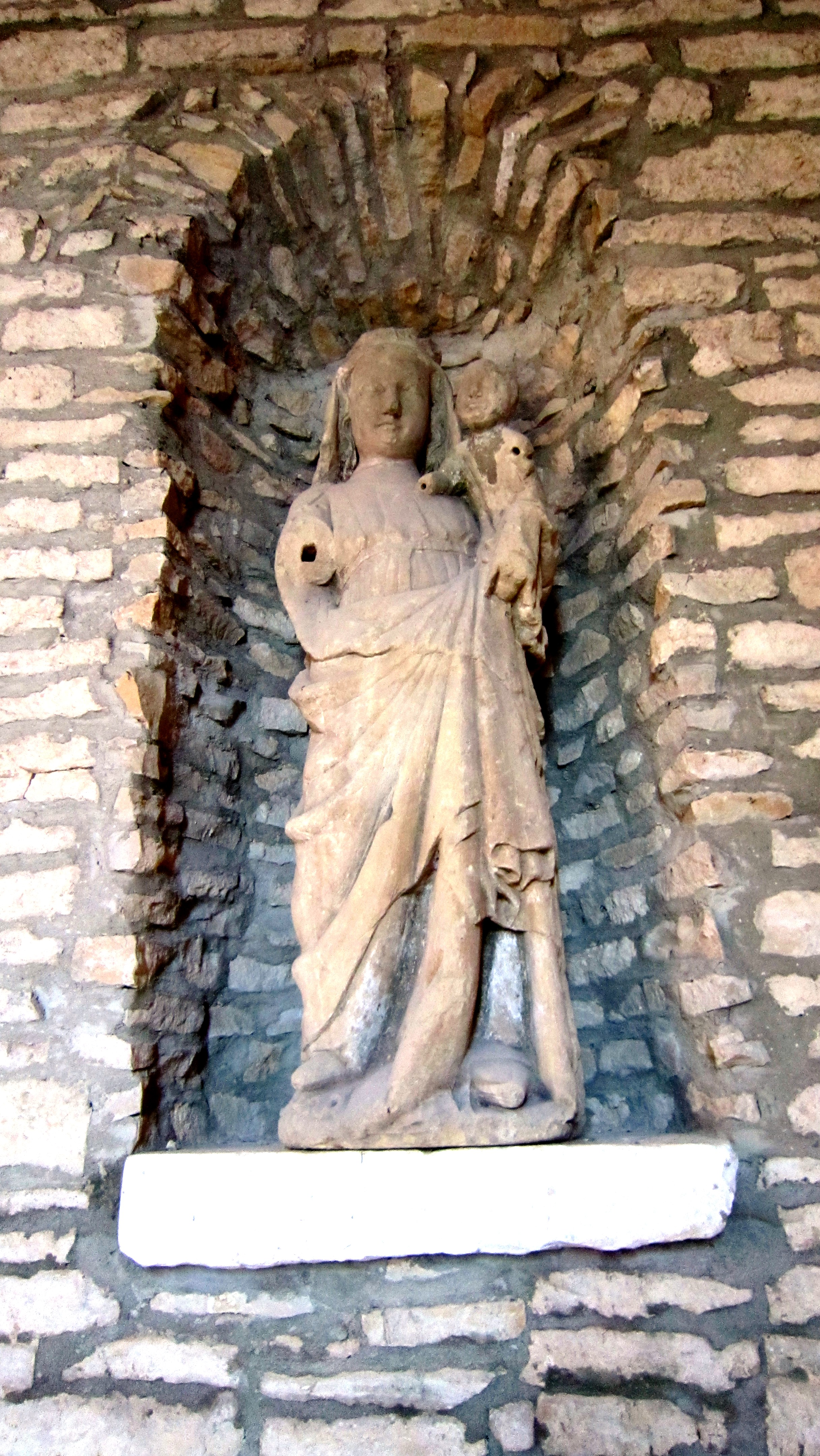 Eglise de Verdonnet Statue du XIV° provenant de l'abbatiale de l'ancien monastère du Puits de l'Orbe